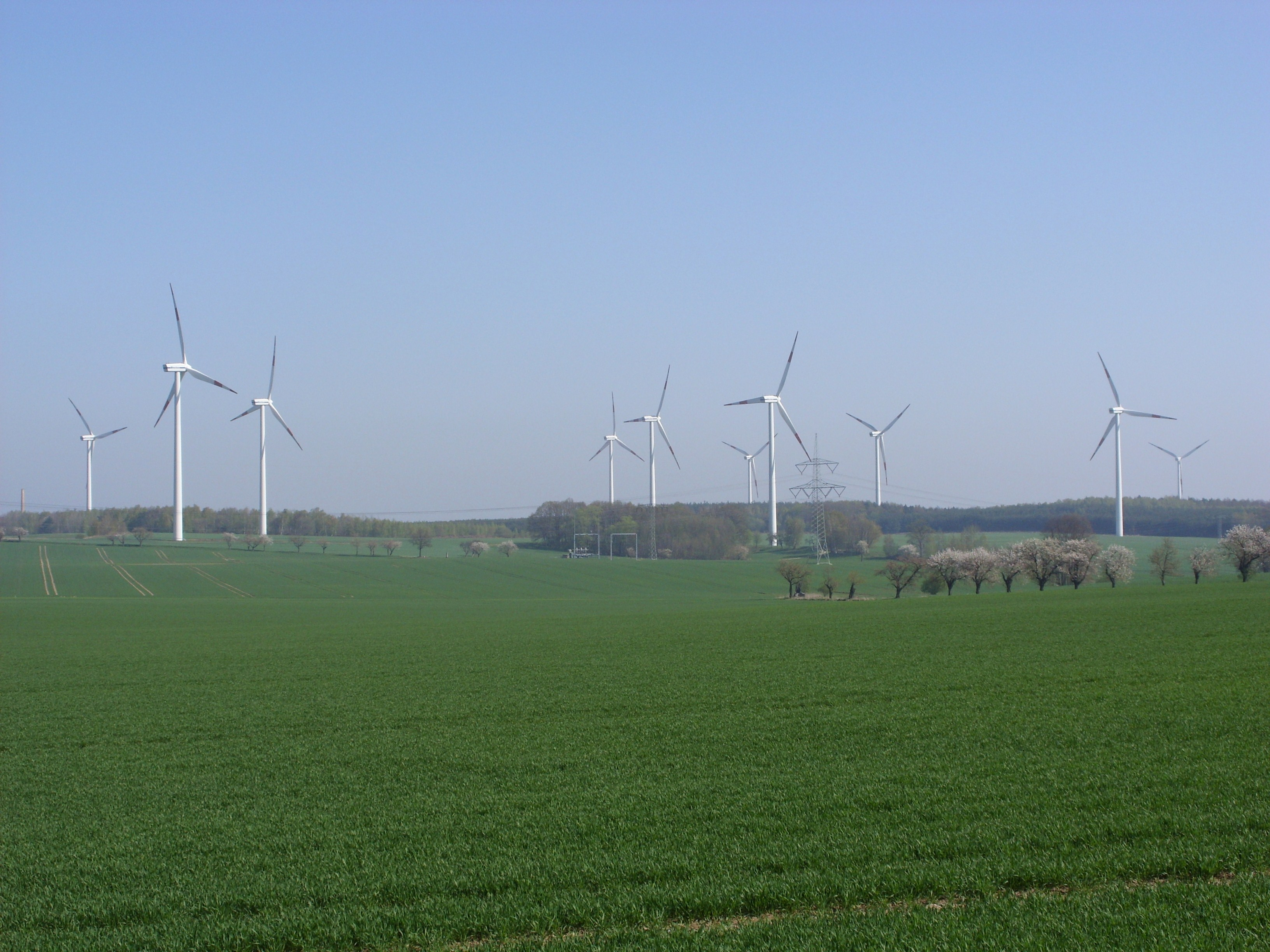 Windräder bei Guhra, Gemeinde Puschwitz, Landkreis Bautzen. Hornjoserbsce: Wětrniki pola Hory, gmejna Bóšicy, wokrjes Budyšin.